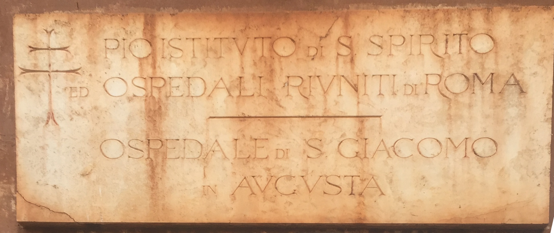 San Giacomo degli Incurabili Roma: Targa del'Ingresso